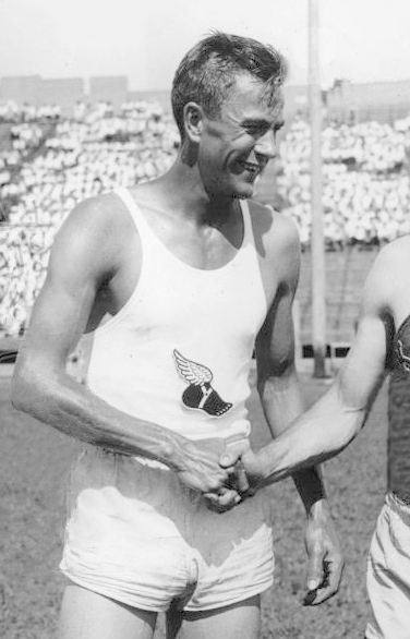 1934 Press Photo Glenn Cunningham, Gene Venzke National A.A.U. Meet - nes15093